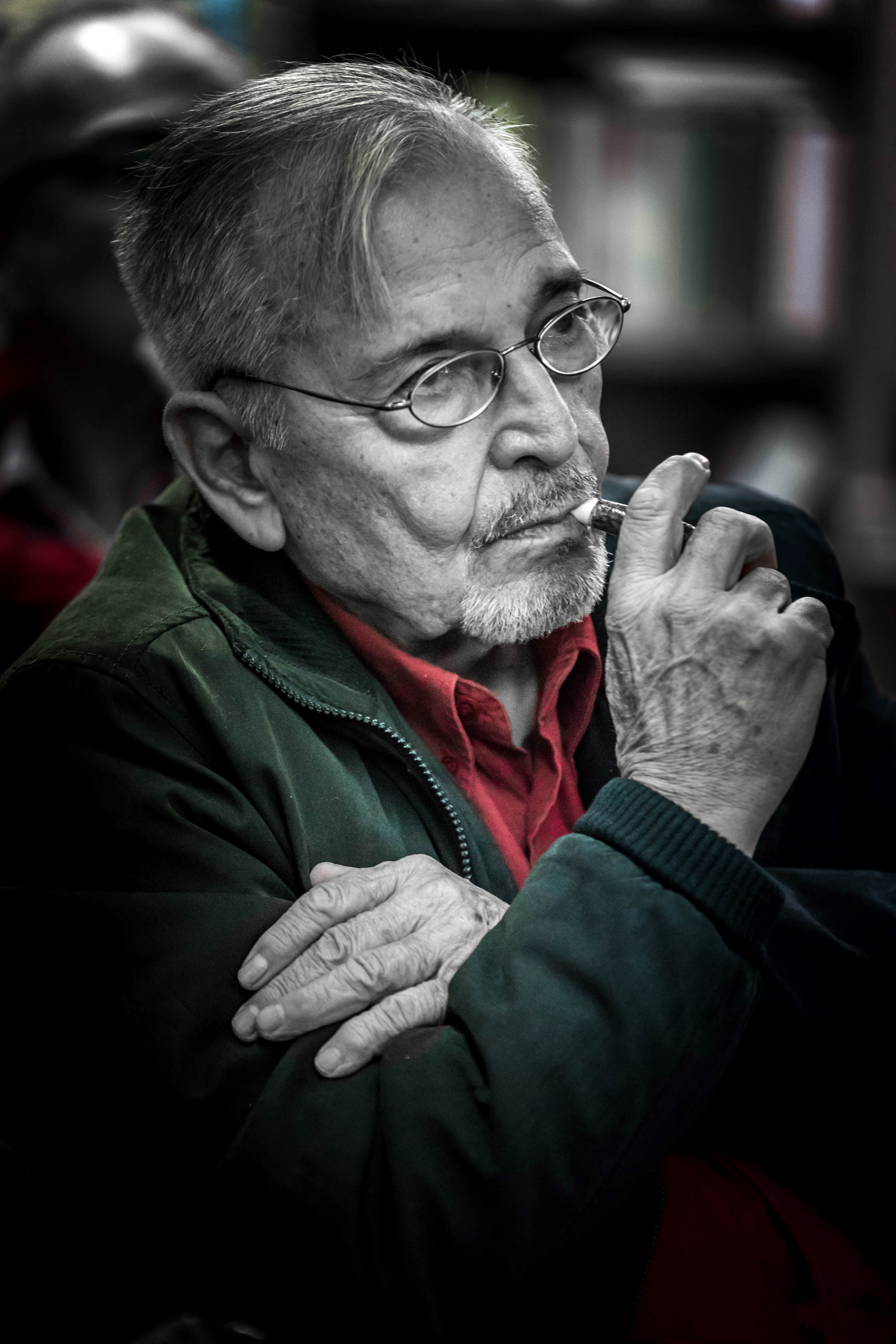 Stratis Haviaras